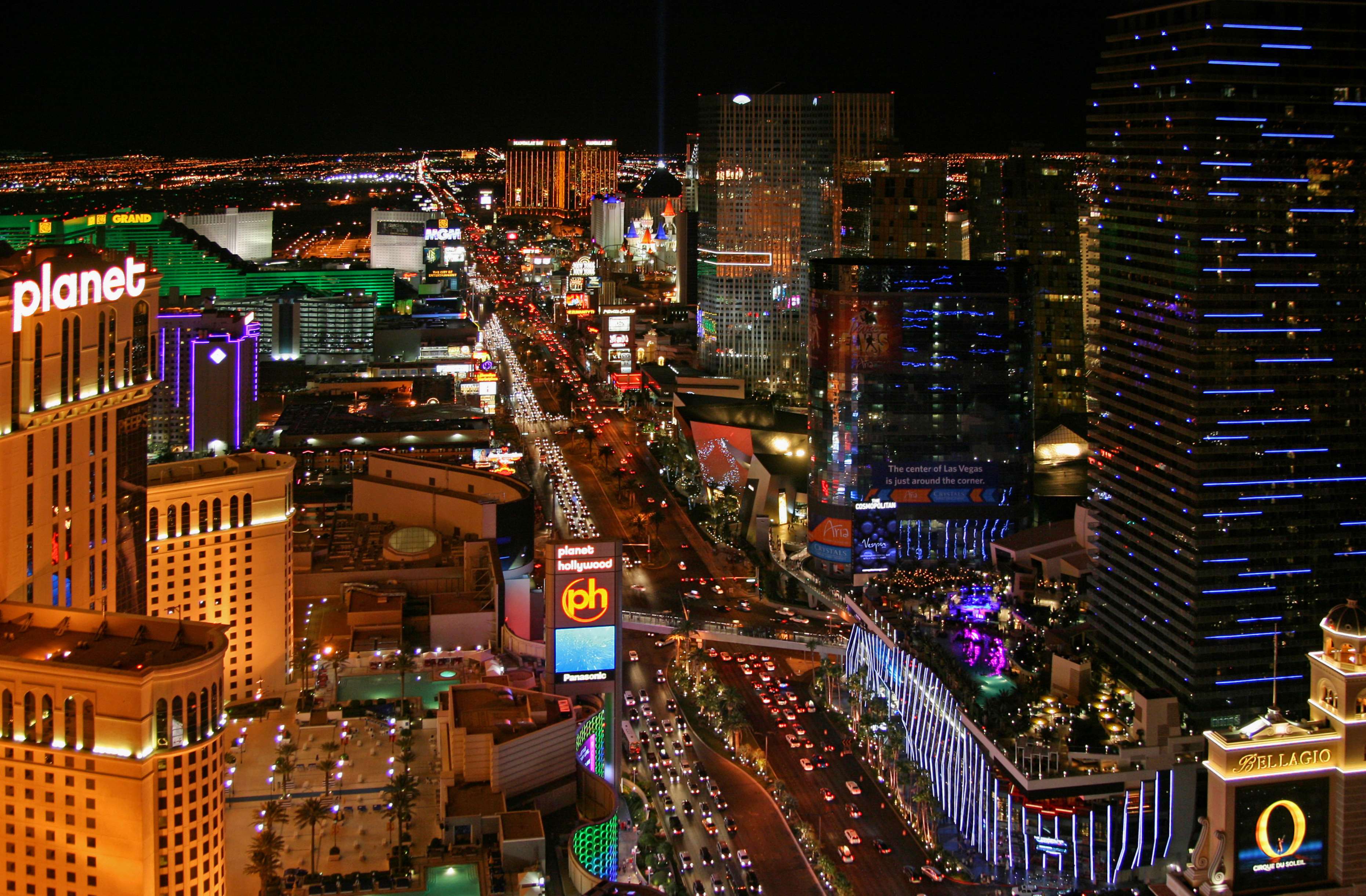 Le strip de Las Vegas vu depuis le sommet de la tour Eiffel du Paris Las Vegas